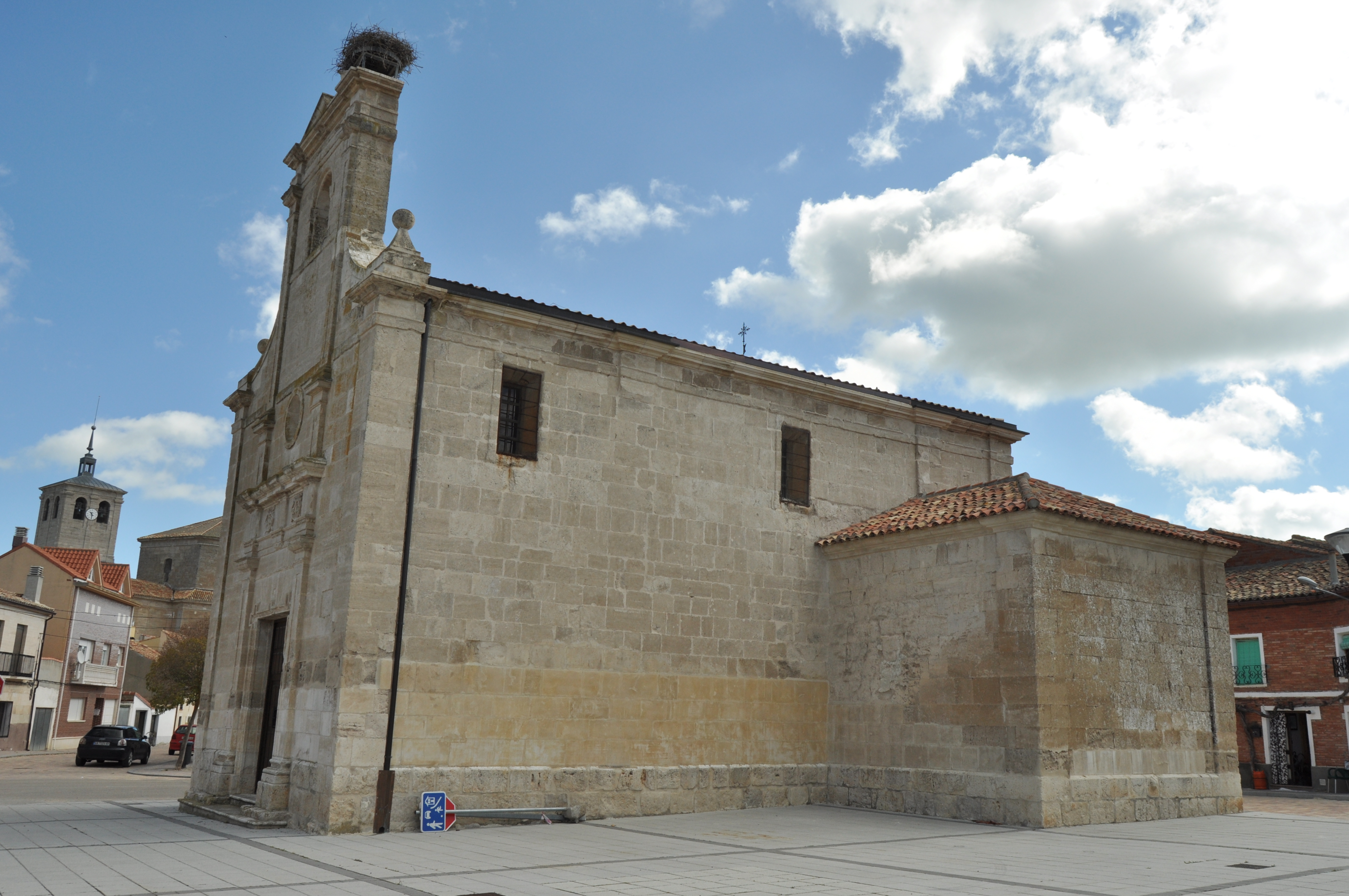 Valoria la Buena - 007